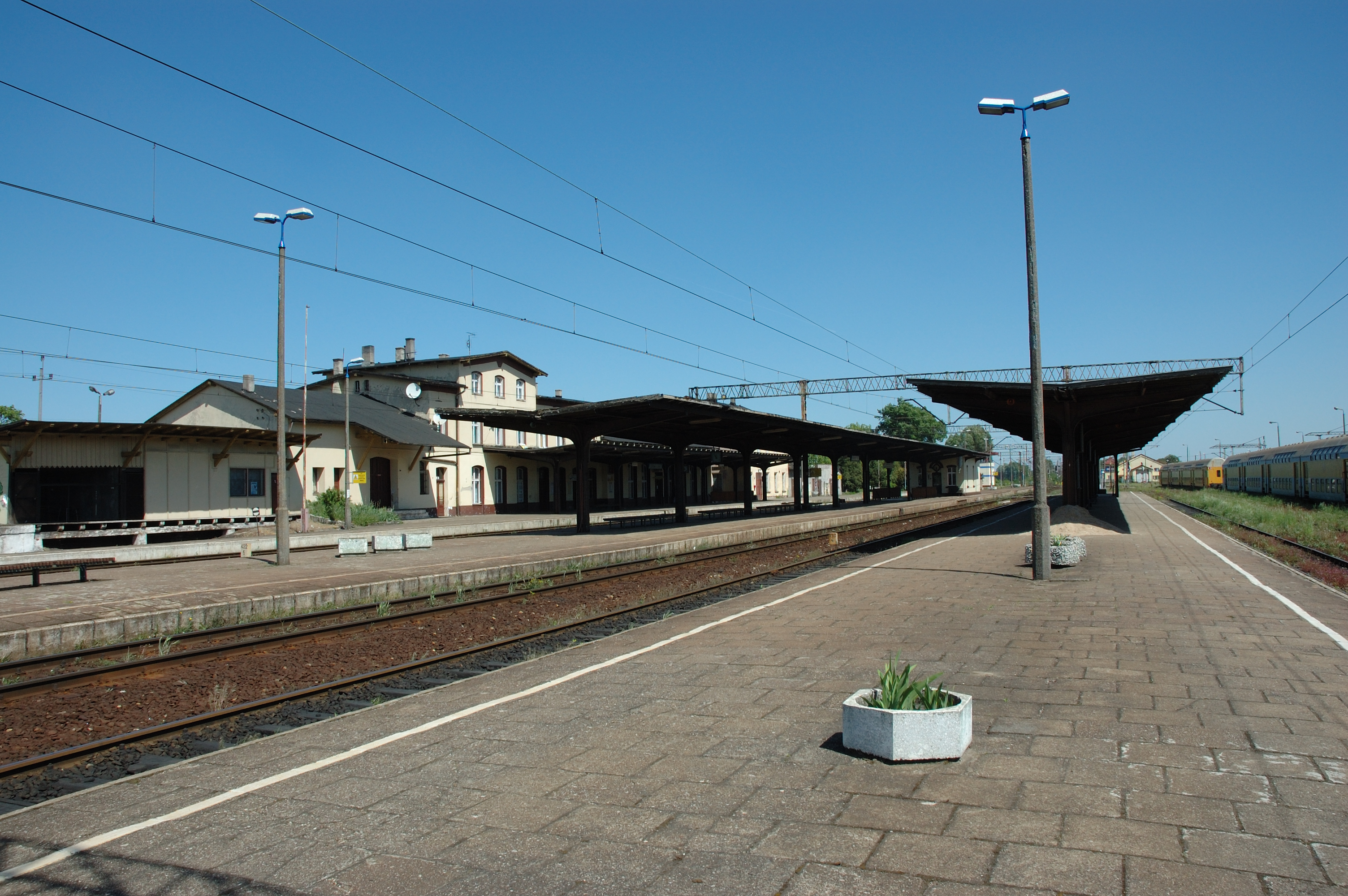 Dworzec od strony południowej.